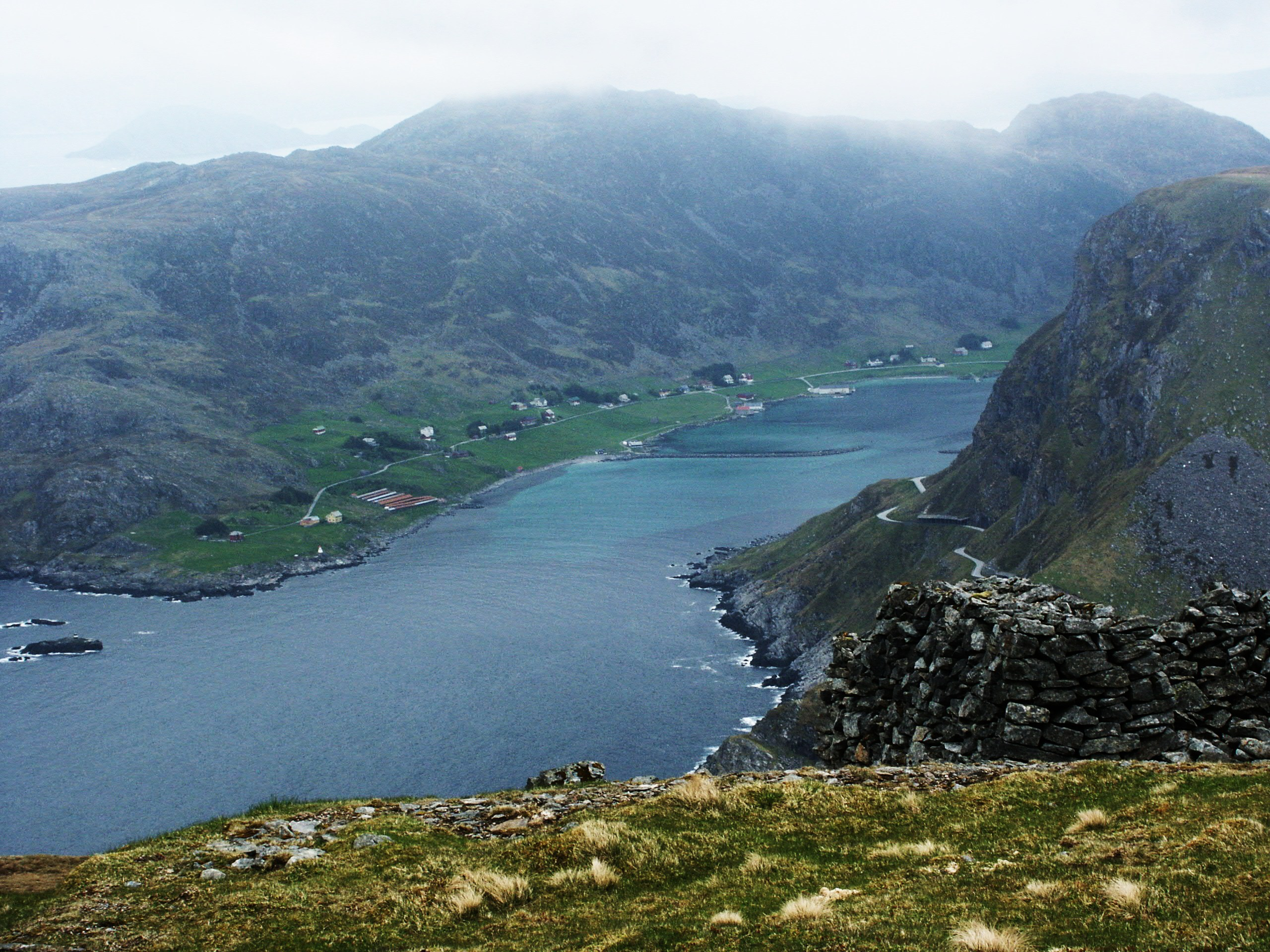 Honningsvåg, Stadtlandet